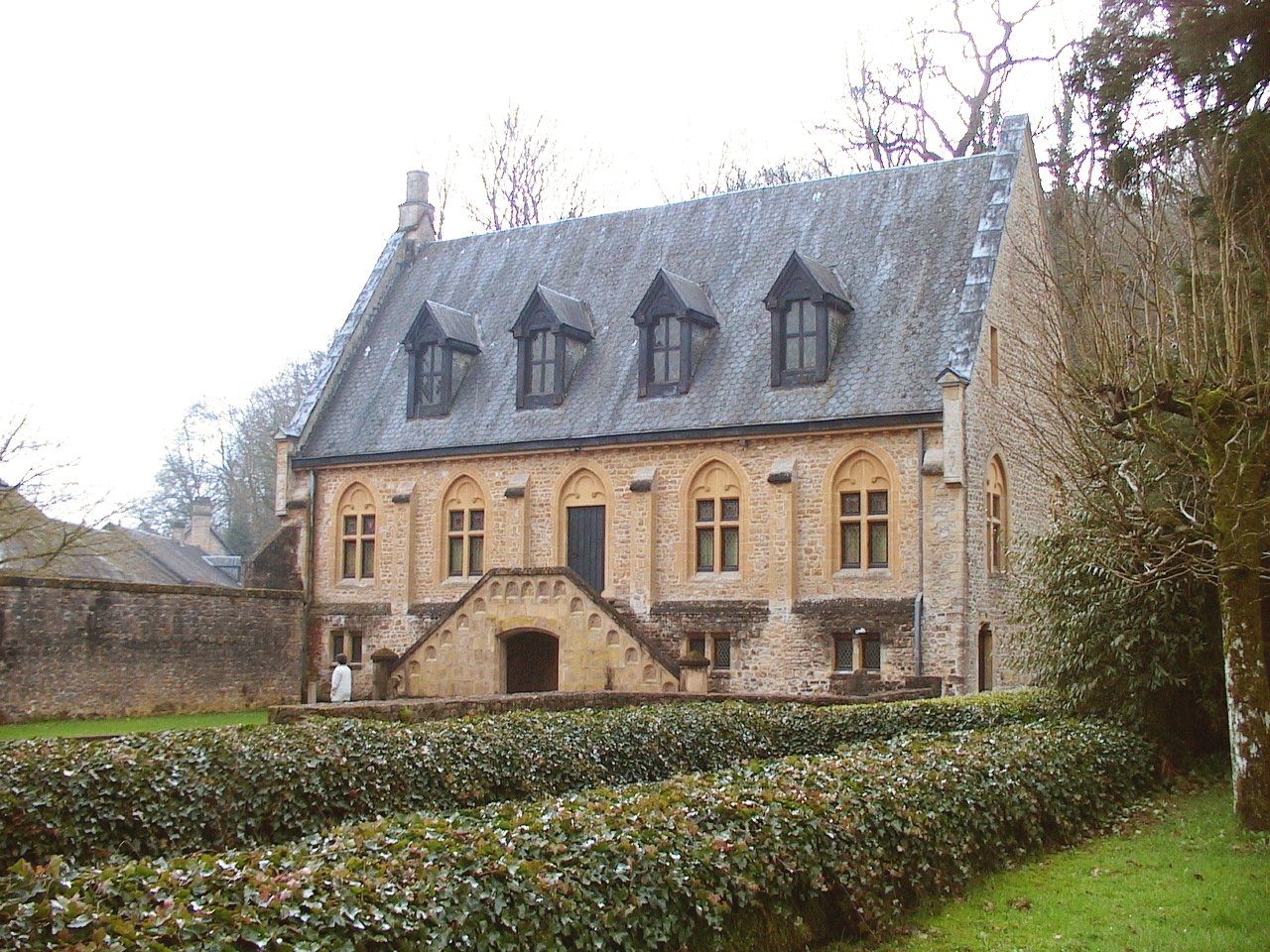 L'abbaye d'Orval (Belgique) : l'hostellerie reconstruite.